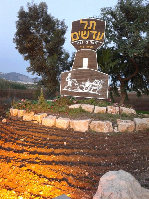 הכניסה לתל עדשים